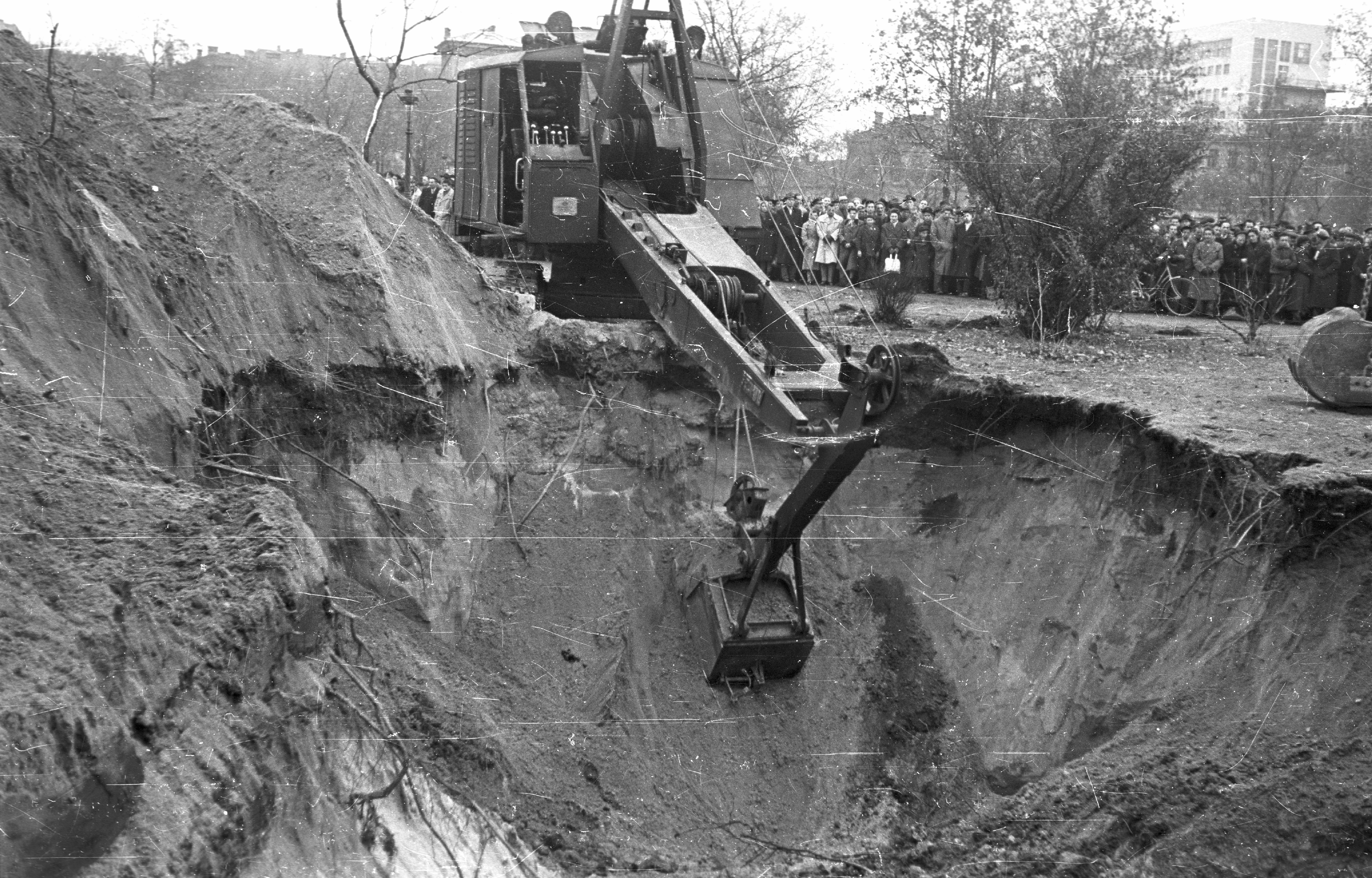 II. János Pál (Köztársaság) tér, a pártházhoz kötődő feltételezett kazamaták keresése. Location: Hungary, Budapest VIII. Tags: excavator, machine, mass, Budapest, revolution Title: II. János Pál (Köztársaság) tér, a pártházhoz kötődő feltételezett kazamaták keresése.